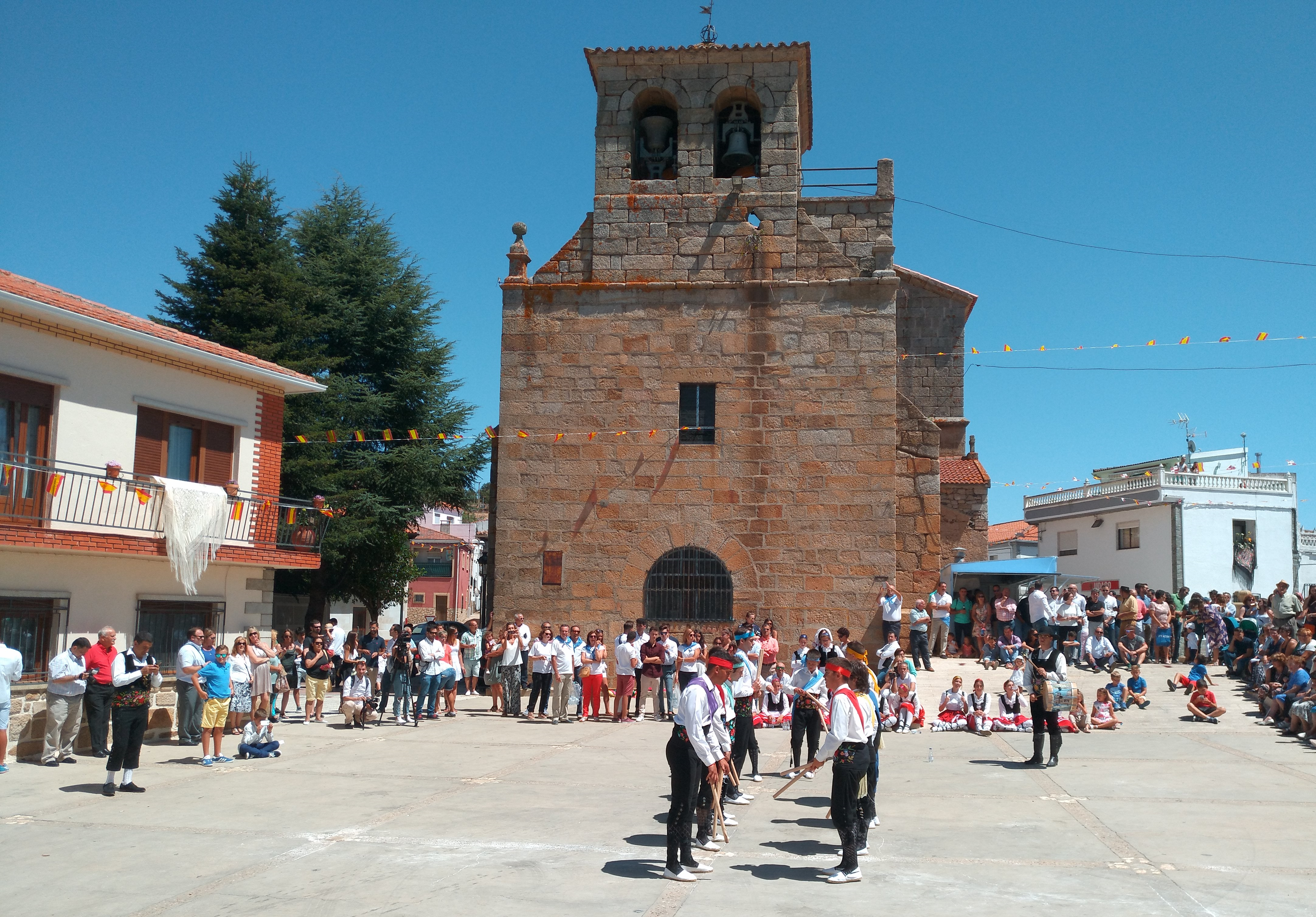 Inicio del paloteo o paleo en las fiestas de San Lorenzo de Saucelle, agosto de 2017.